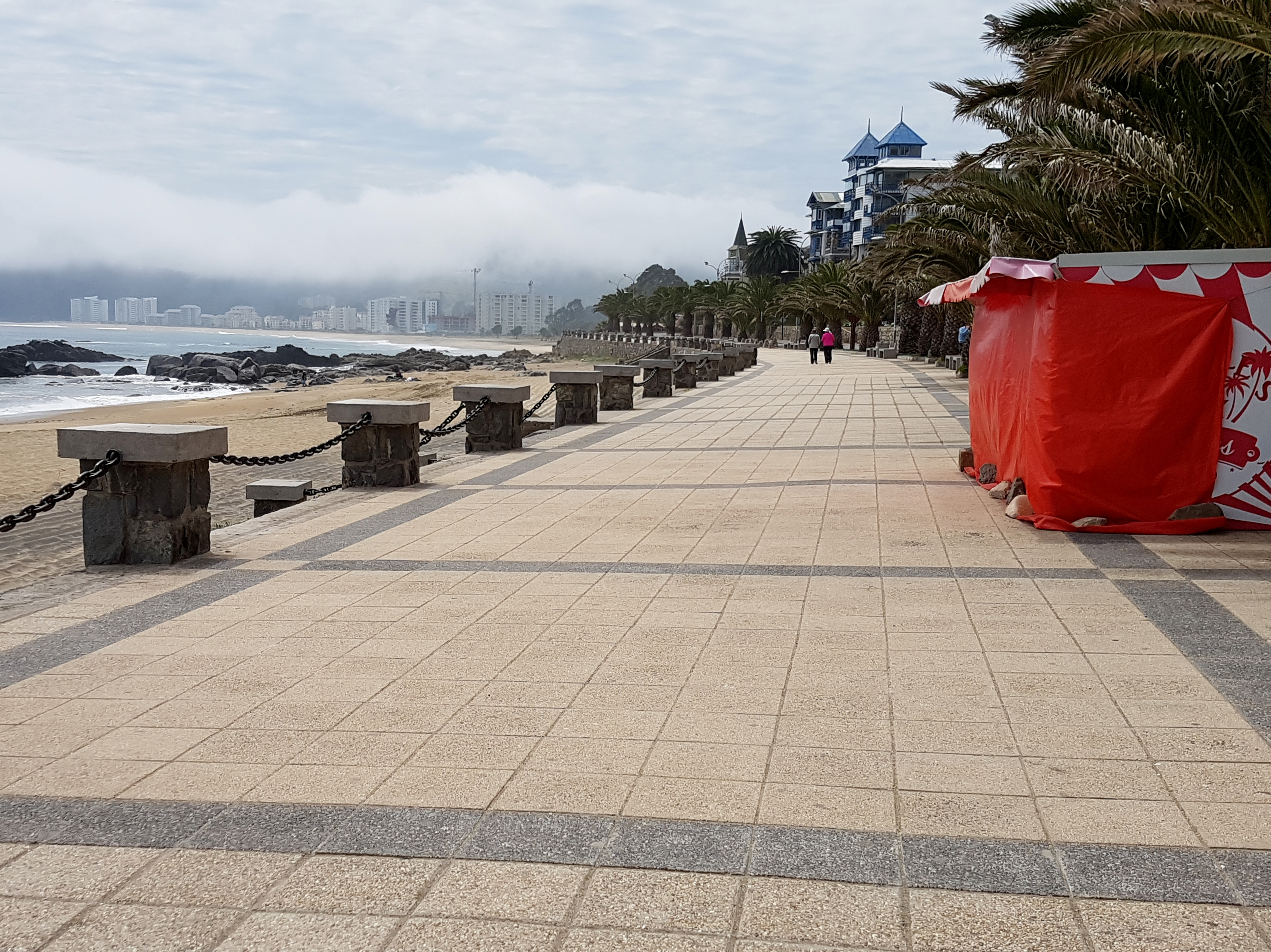 La Terraza de Papudo, Chile.